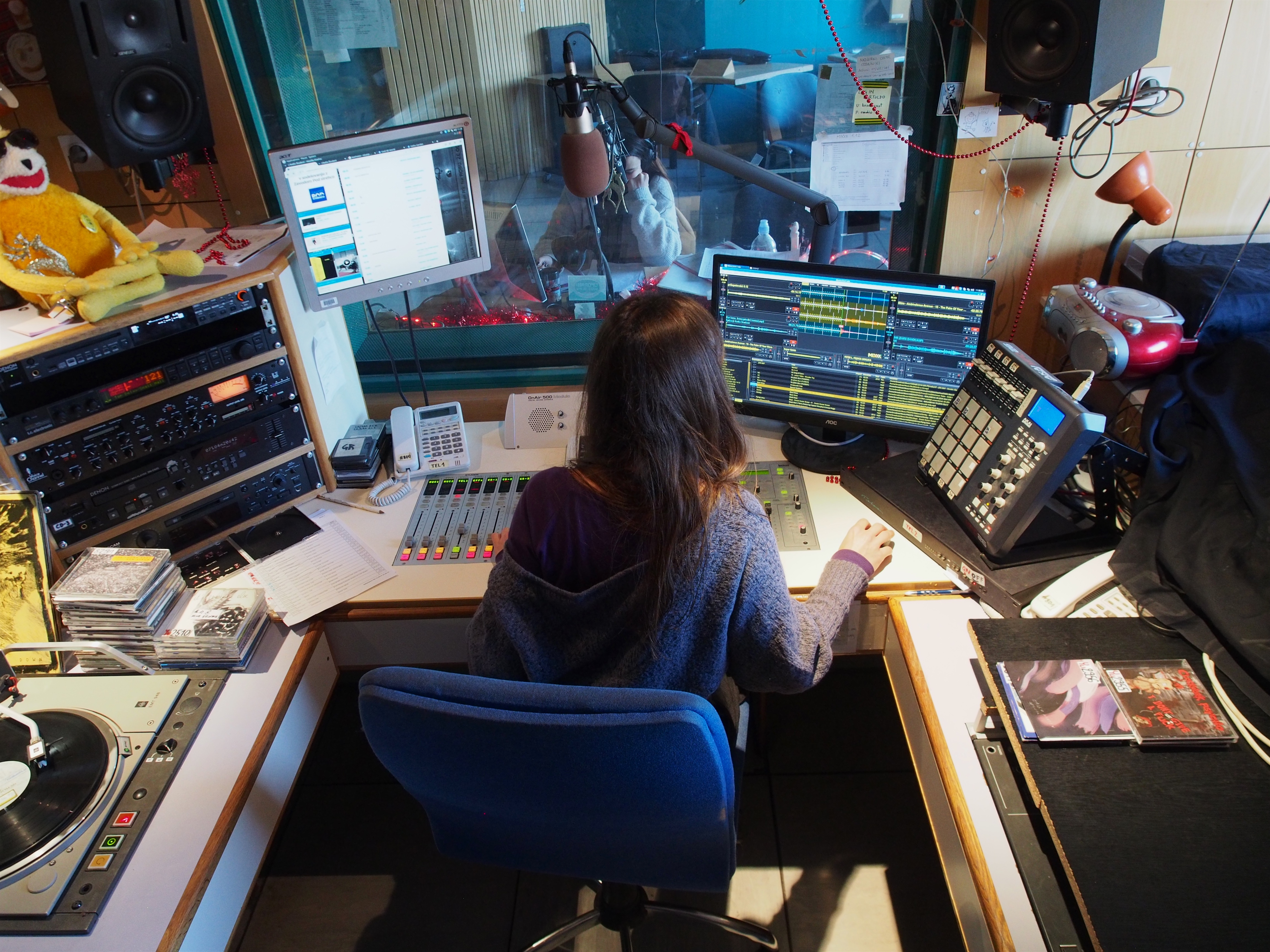 radiostudent.si